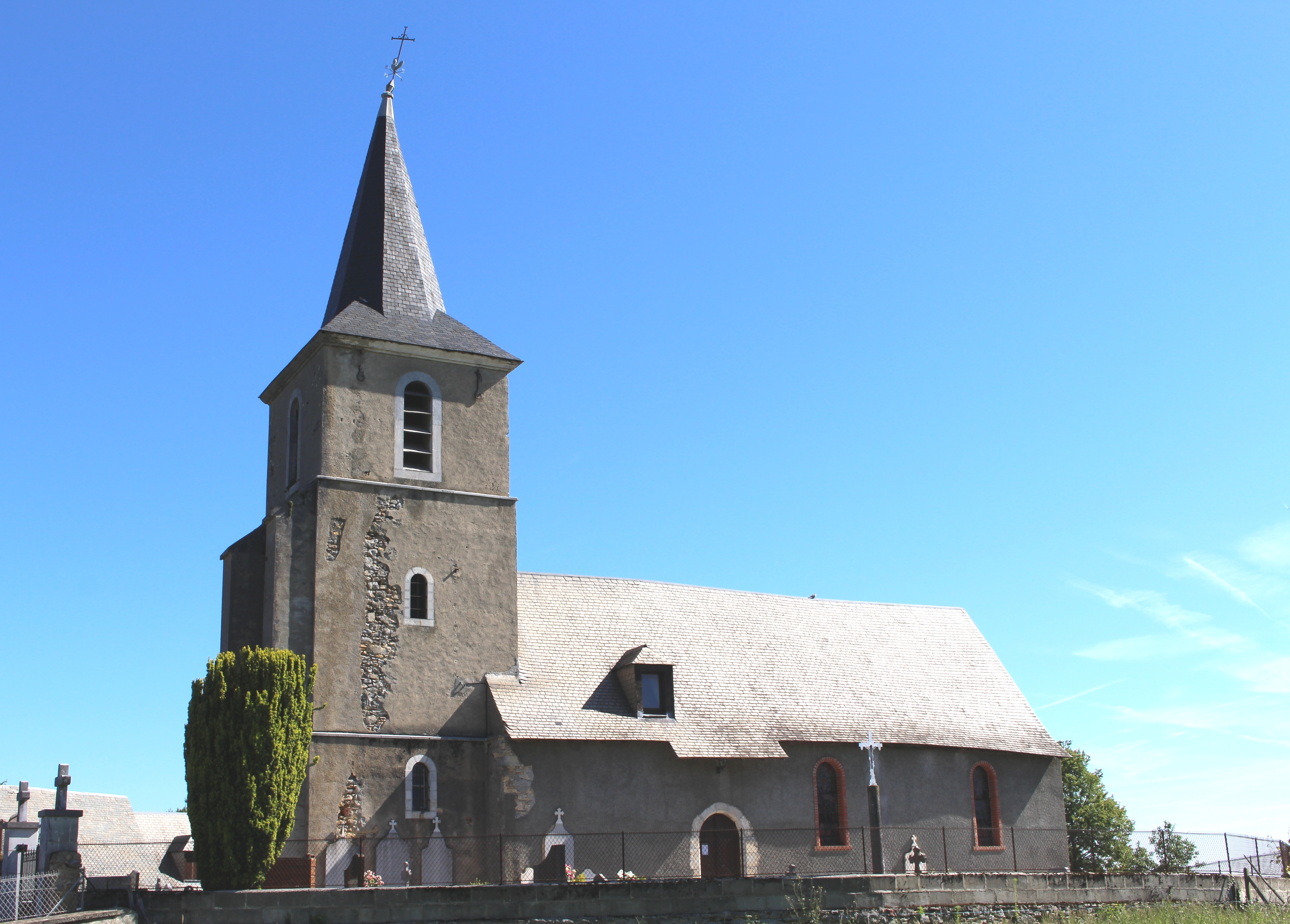 Église Saint-Pierre de Bettes (Hautes-Pyrénées)